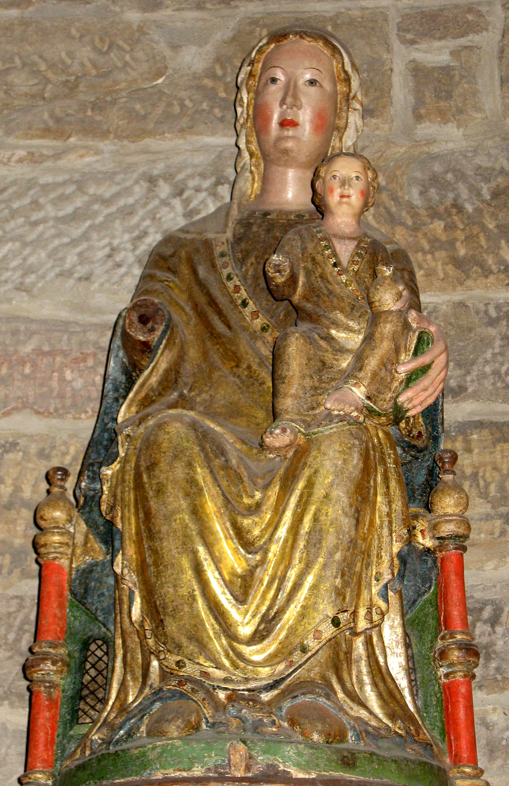 Marienkirche Dortmund, "Goldene Muttergottes von Dortmund", romanische Marienfigur aus dem Jahre 1230 aus Holz, Südwand des Altarraumes. Rückenbemalung deutet auf die Verwendung als Prozessionsfigur